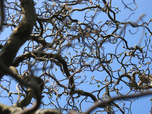 Corylus avellana 'Contorta' Gefotografeerd door Tim Bekaert (28/3/2004) in de eigen tuin te Heule (Kortrijk) first version nl.wikipedia 01:35, 7. Feb 2005 . . Tbc (85318 Byte) (Gefotografeerd door Tim Bekaert (28/3/2004) in de eigen tuin te Heule (Kortrijk))